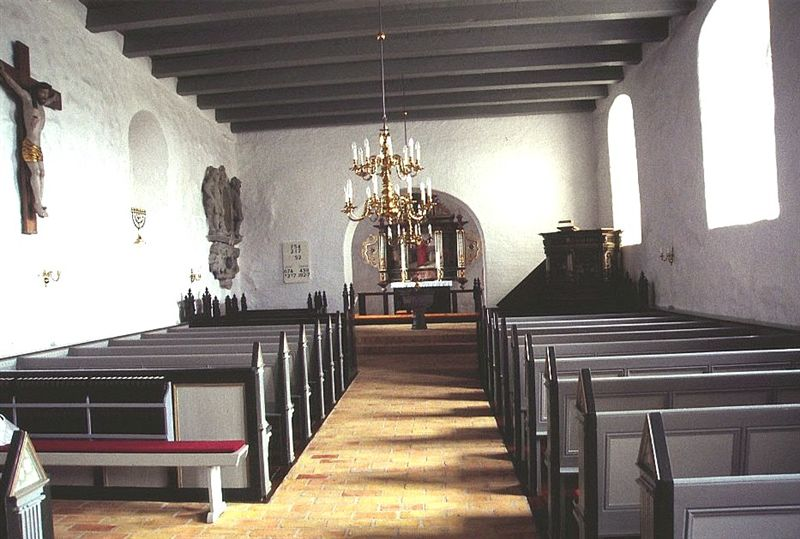 Flynder Kirke i Danmark. Skibet set mod øst